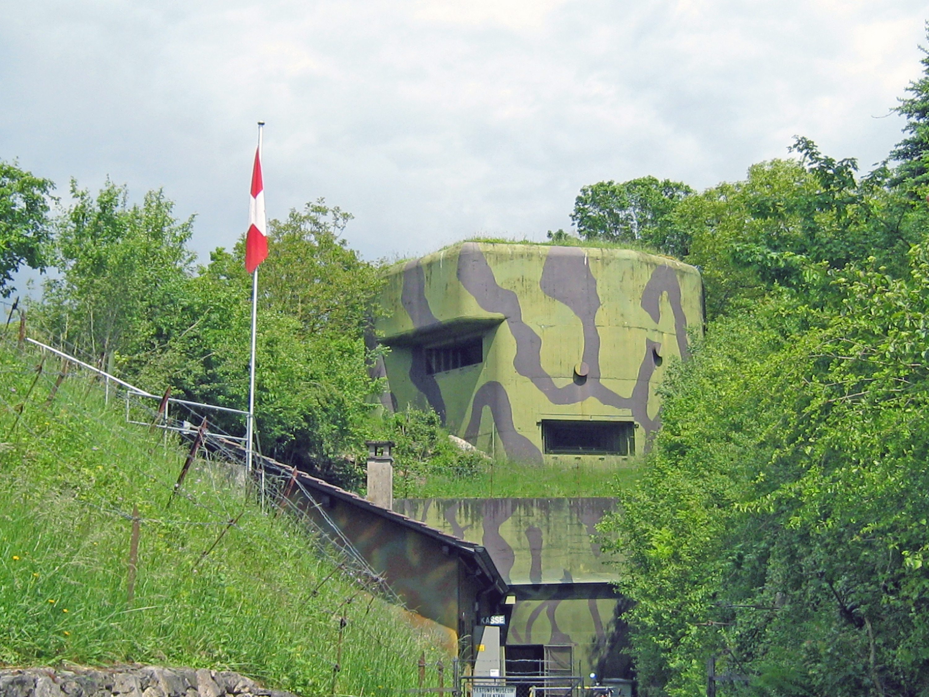 Eingangsbereich Festung Reuenthal